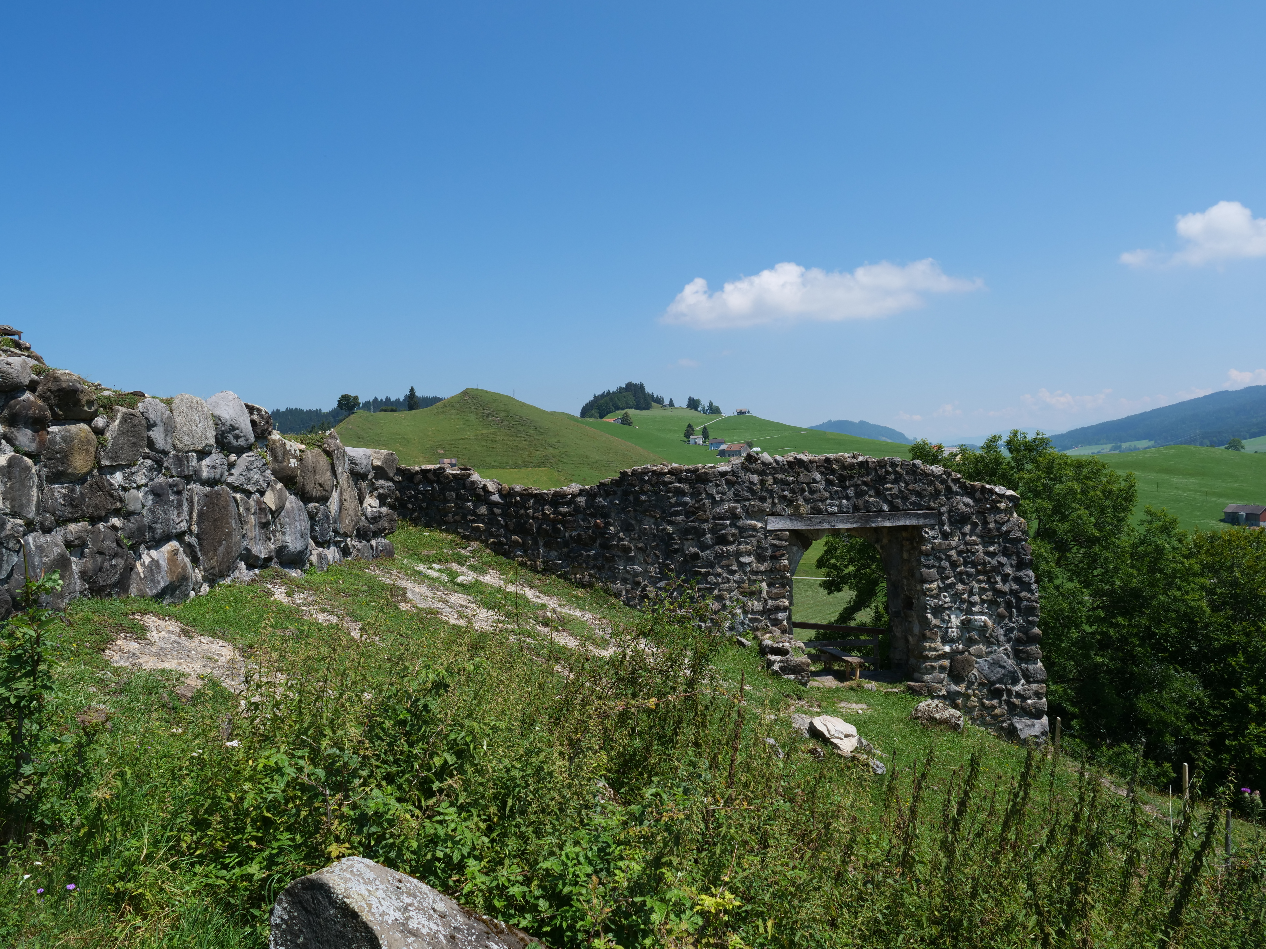 Burgruine Clanx